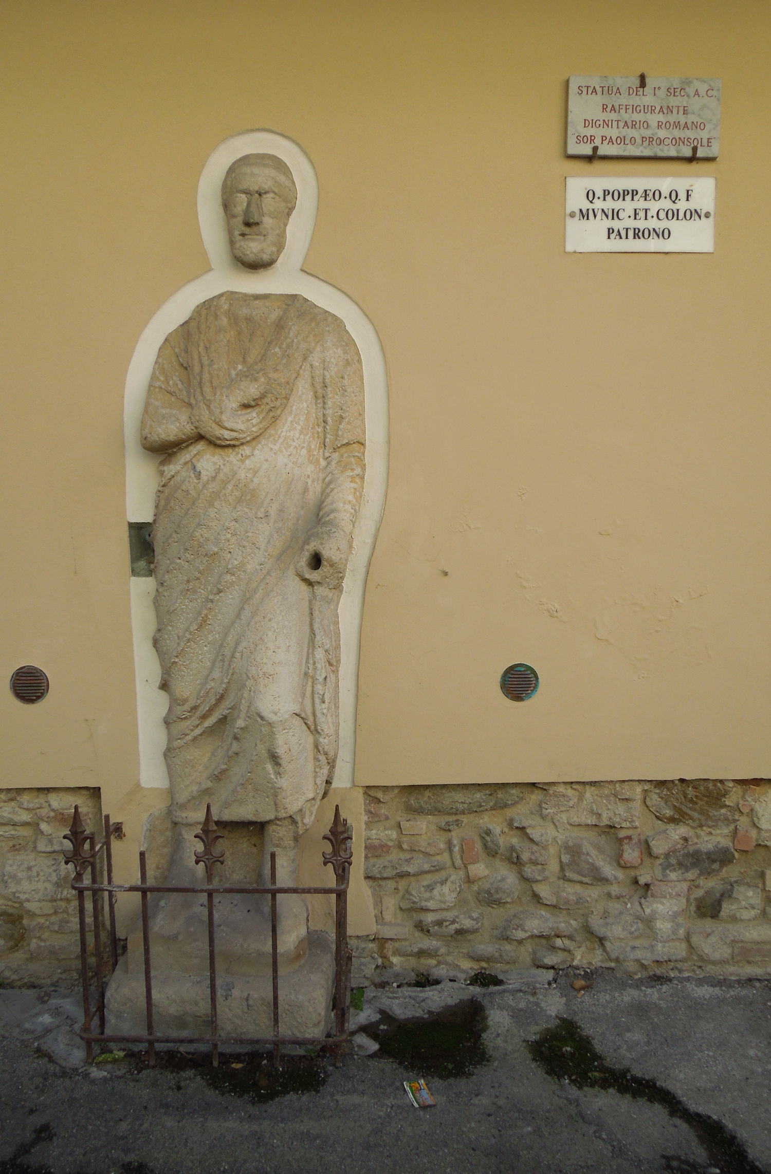 Statua di Sor Paolo Proconsole, dignitario romano, eseguita nel I secolo a.C. immurata in Largo Proconsole nella città di Teramo.